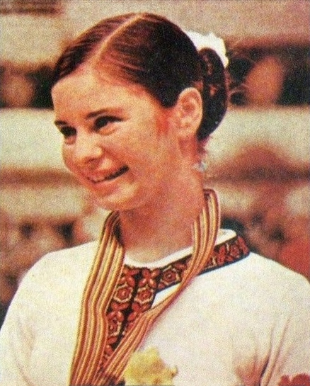 SPORT VEDETTES-PANINI 1974-Figurina n.233- ERRATH - DDR -SPORT INVERNALI-Rec